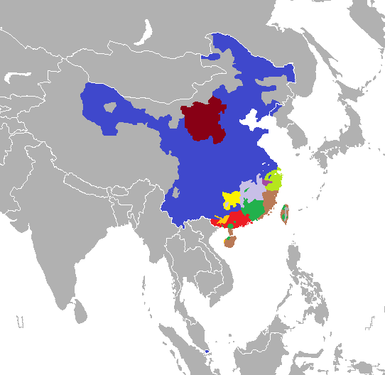 Lenguas siníticas